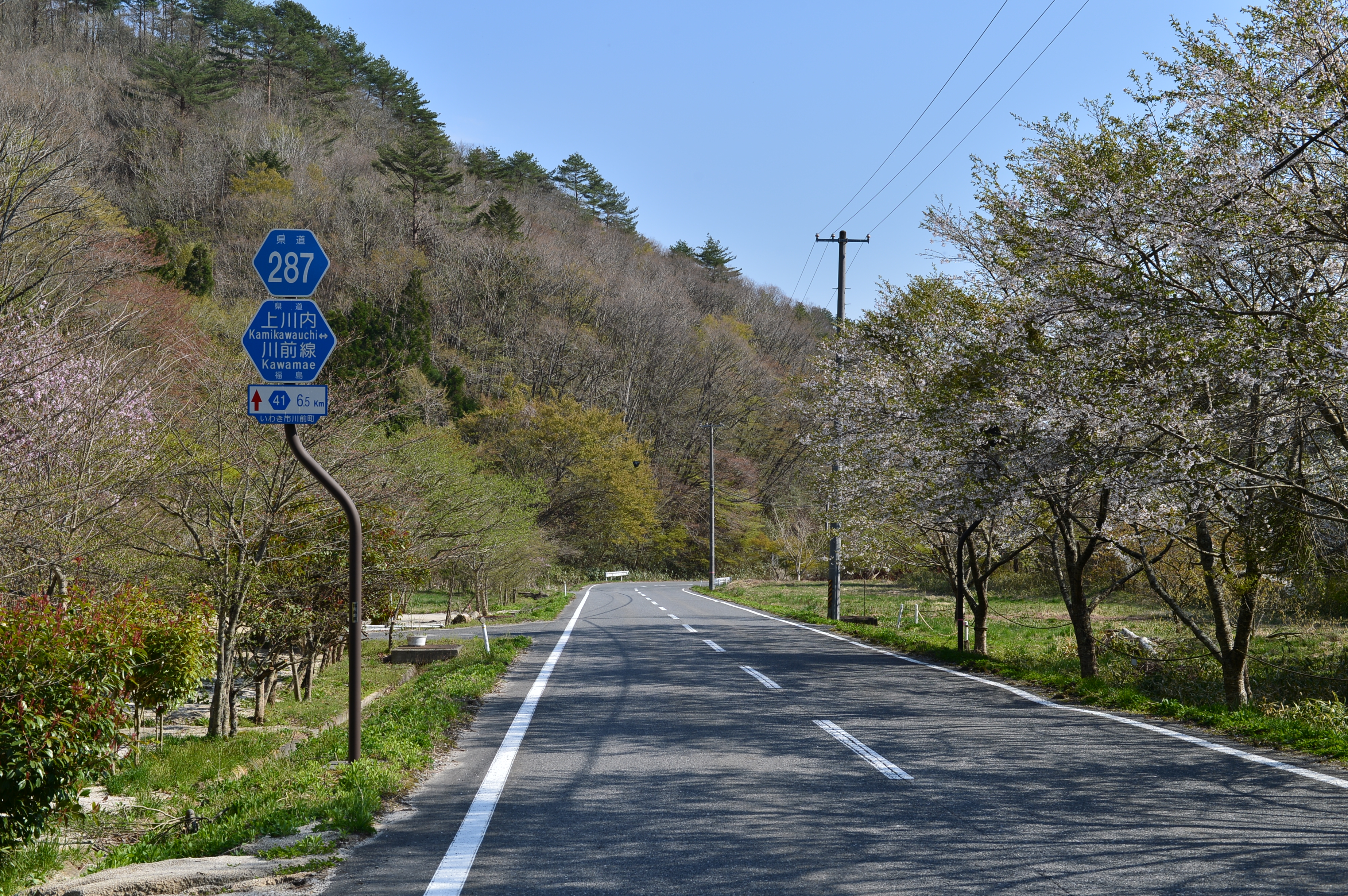 福島県道287号上河内川前線（いわき市川前町下桶売）